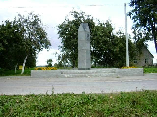 Paminklas Laurynui Stuokai-Gucevičiui